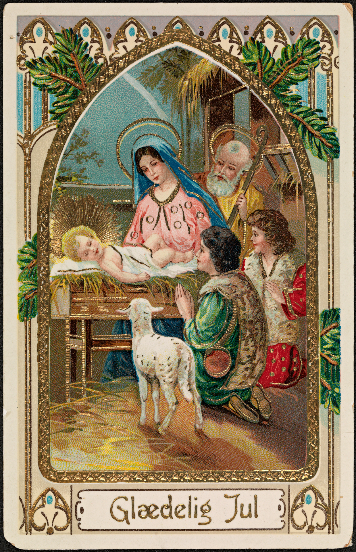 Tittel / Title: Glædelig Jul, ca 1912 Motiv / Motif: Postkort / julekort. Dato / Date: ca 1912 Kunstner / Artist: ukjent / unknown Utgiver / publisher: G. G. K. No. 368 (trykket i Tyskland) Eier / Owner Institution: Nasjonalbiblioteket / National Library of Norway Lenke / Link: Bildesignatur / Image Number: blds_04551